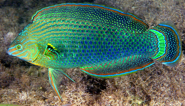 Une girelle arc-en-ciel ou labre obscur (Halichoeres marginatus) à la Réunion.